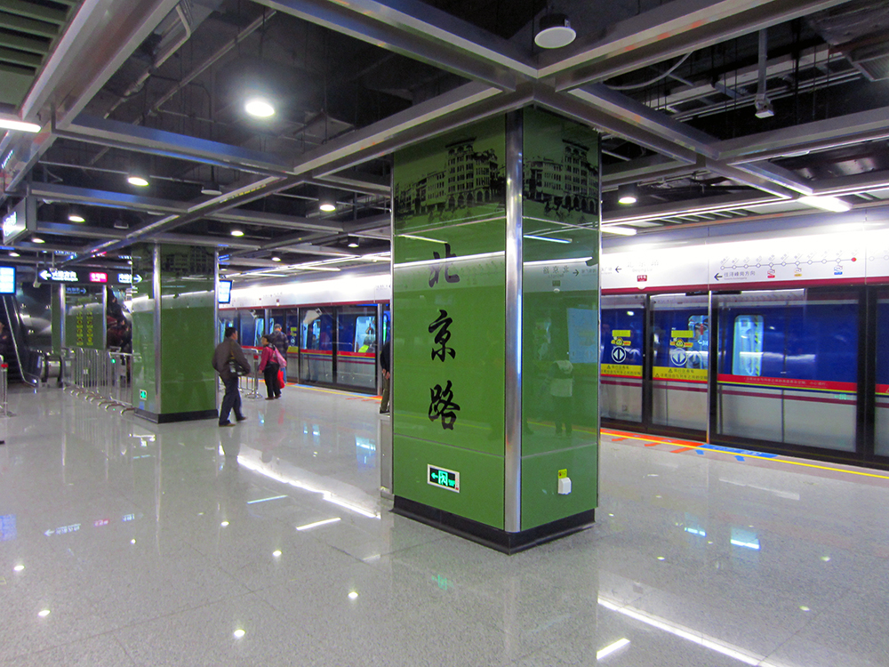 北京路站站台